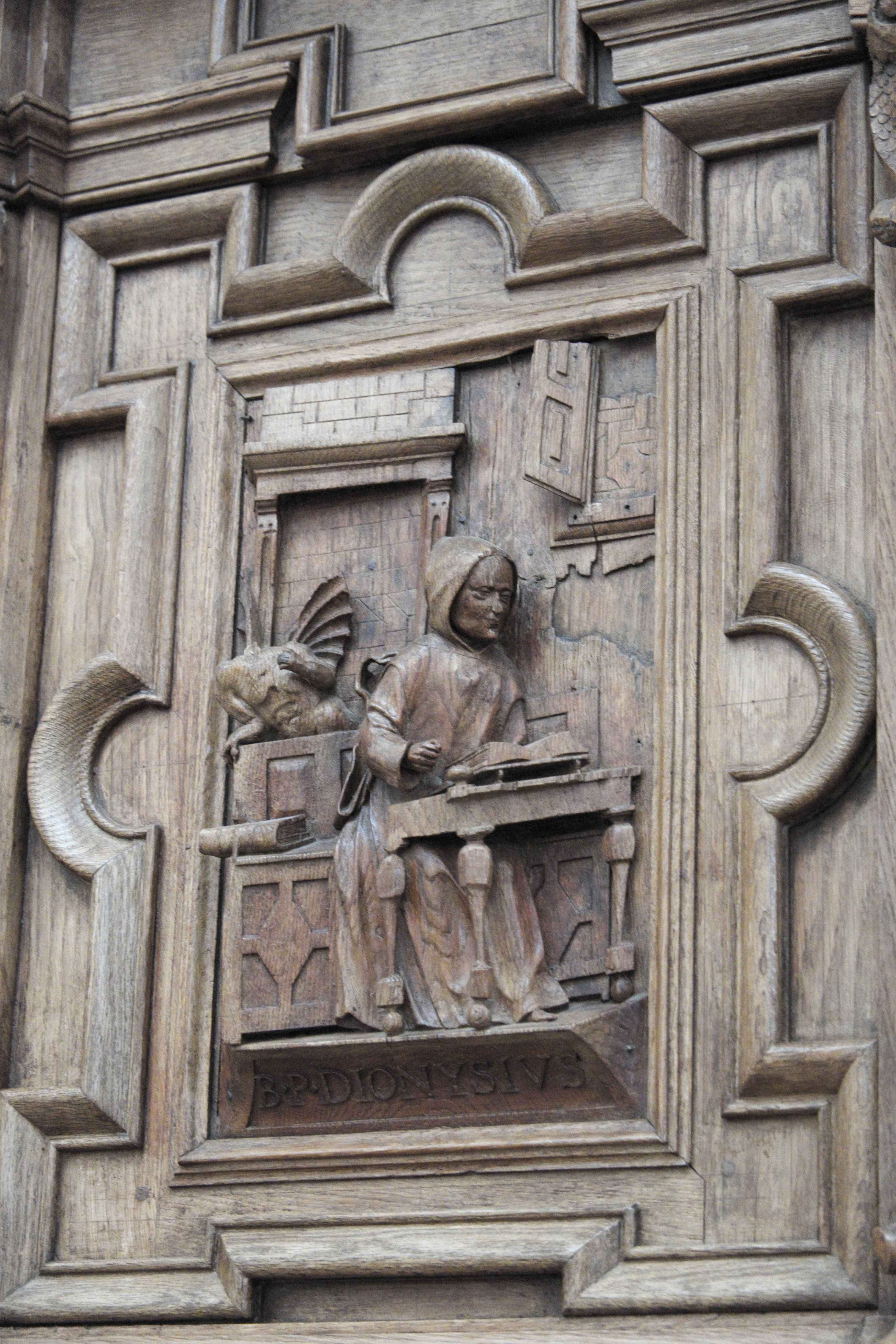 Kanzel in der Kathedrale Notre-Dame in Laon im Département Aisne/Picardie (Frankreich), von 1681, aus der Kartause Val-Saint-Pierre in Braye-en-Thiérache/Aisne; Kanzelkorb mit Reliefdarstellung von Dionysius dem Kartäuser